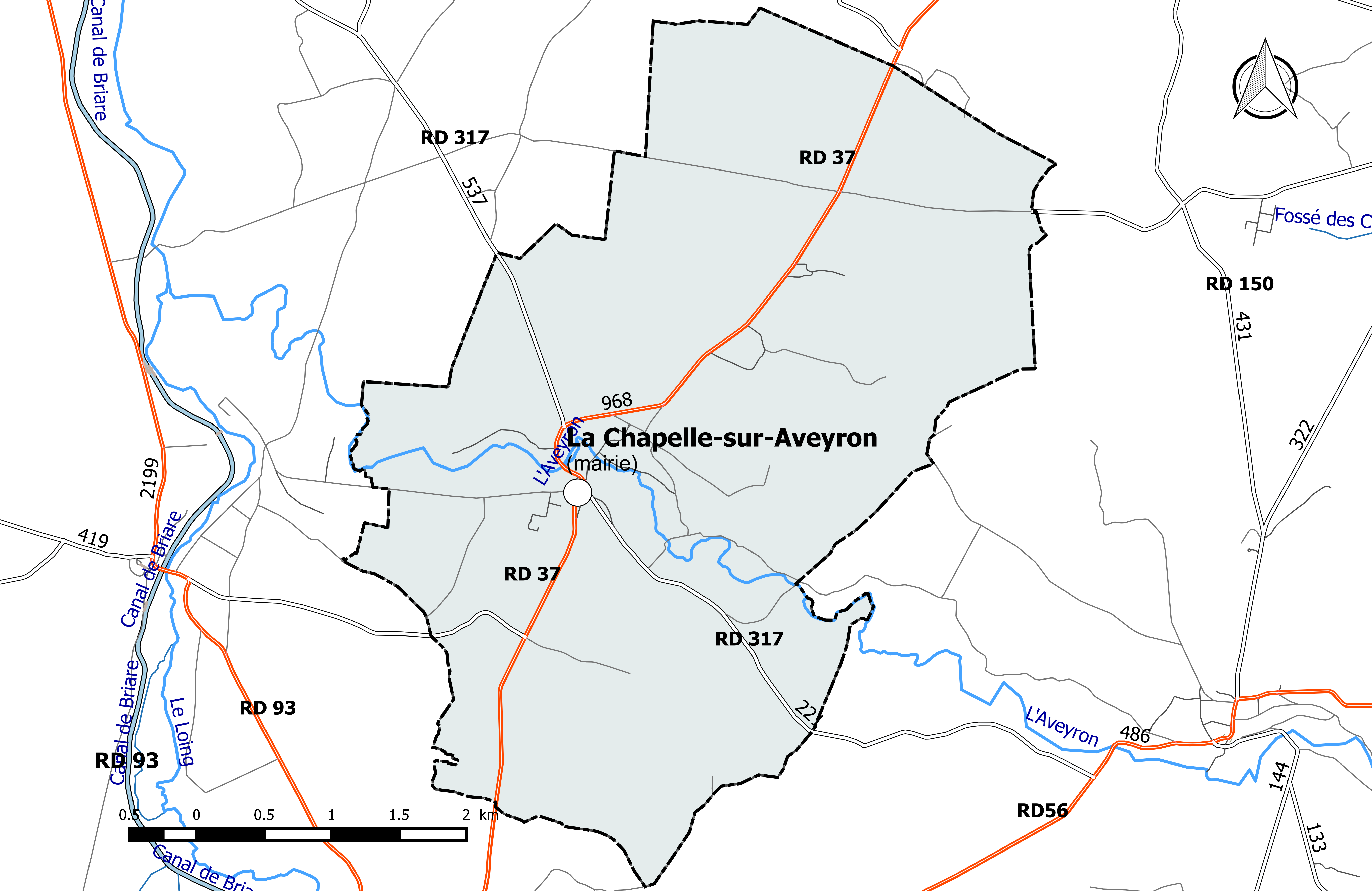 Carte du réseau routier de la commune de La Chapelle-sur-Aveyron.